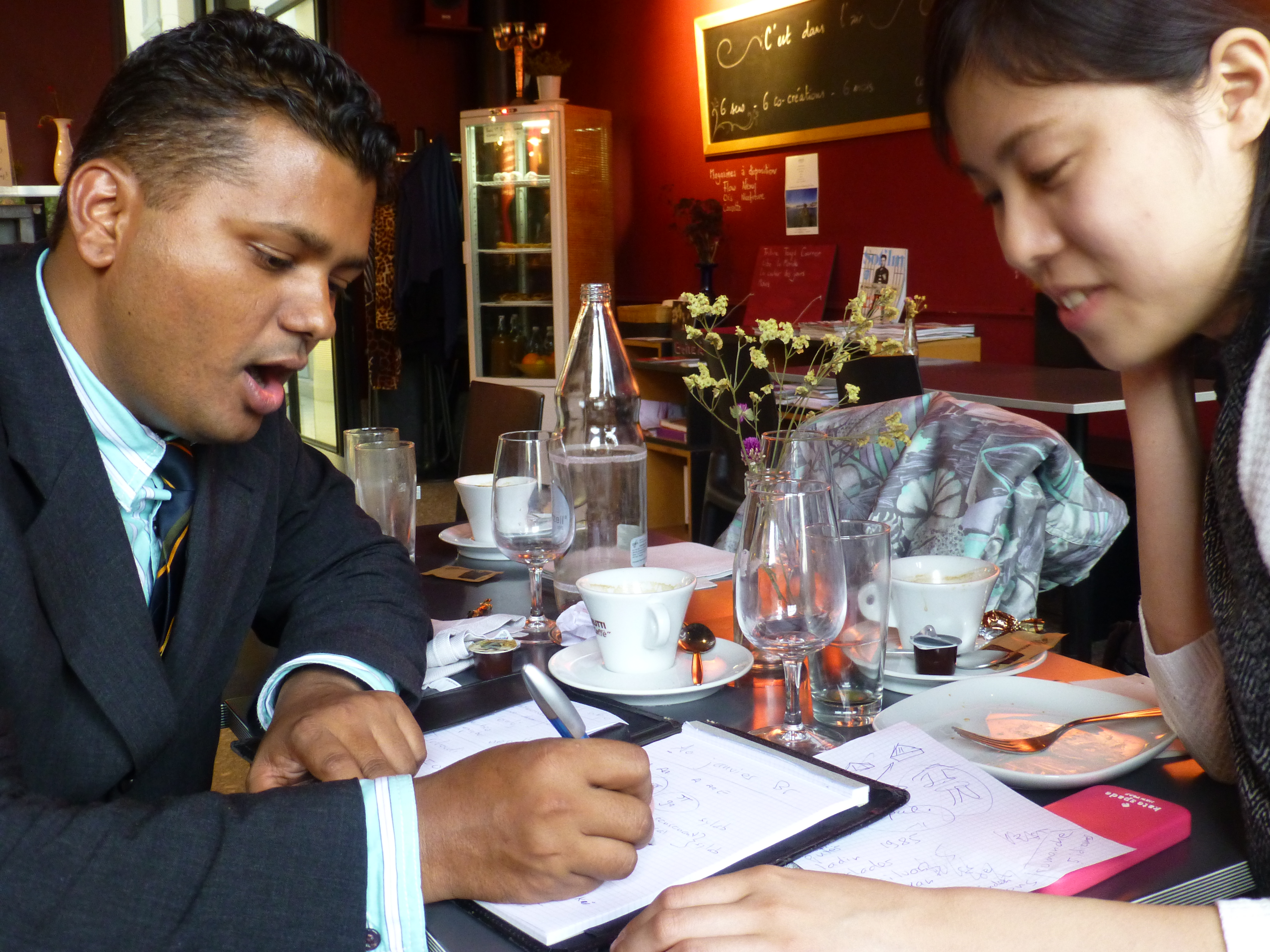 Du homoj kunvenas por lerni la lingvon de la aliulo.